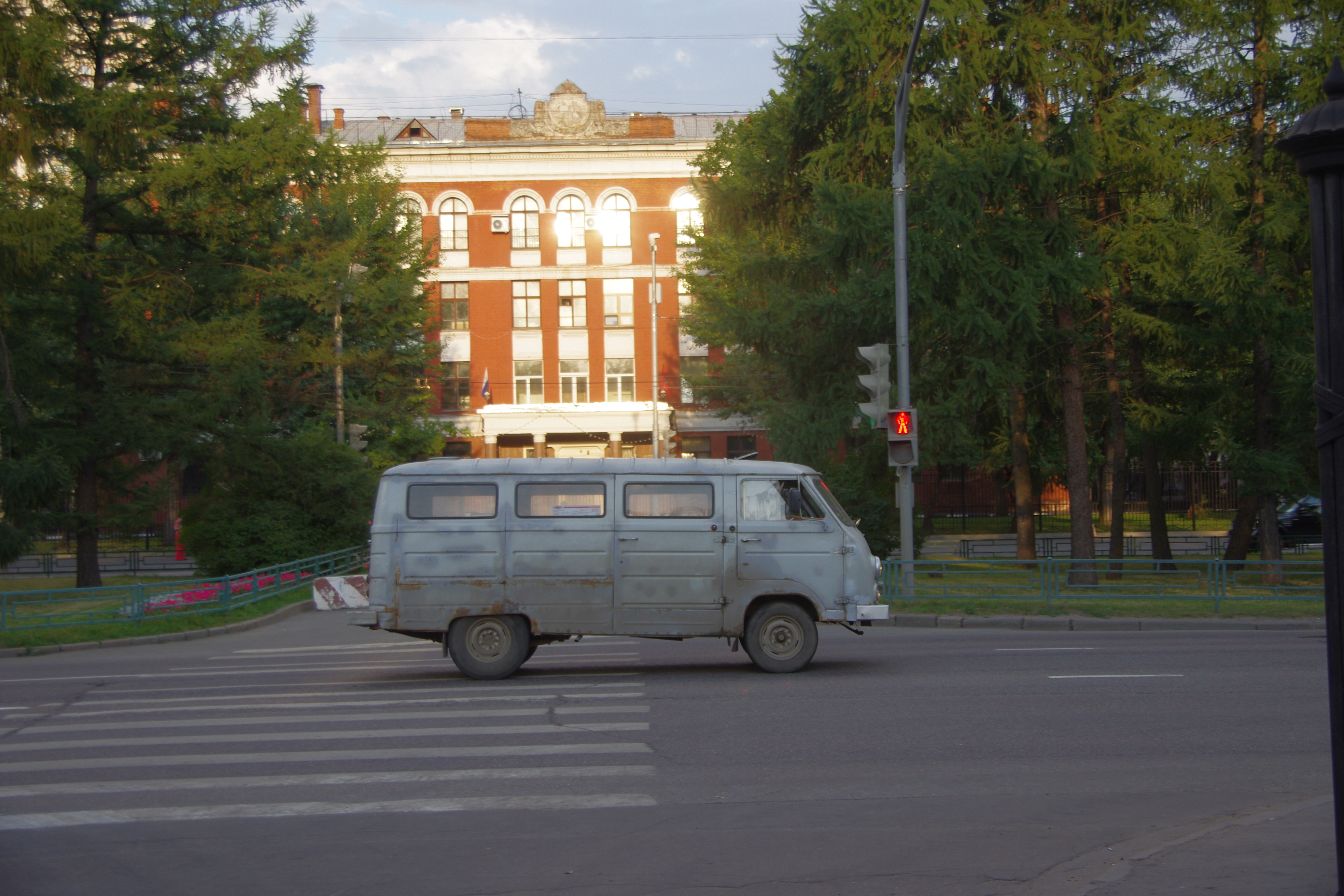 РАФ-977 на Новопесчаной улице.